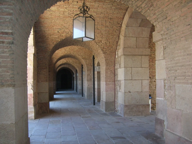 Castell de Montjuic - interiors